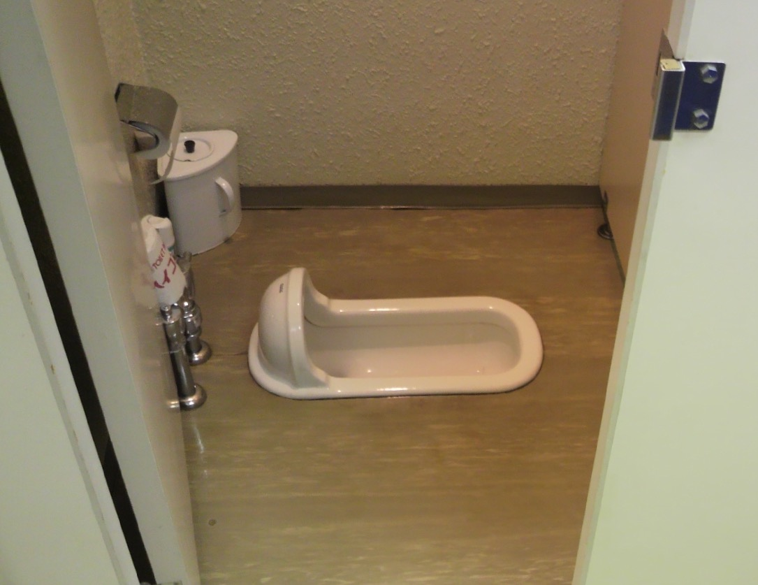 TOTO C75 NW1